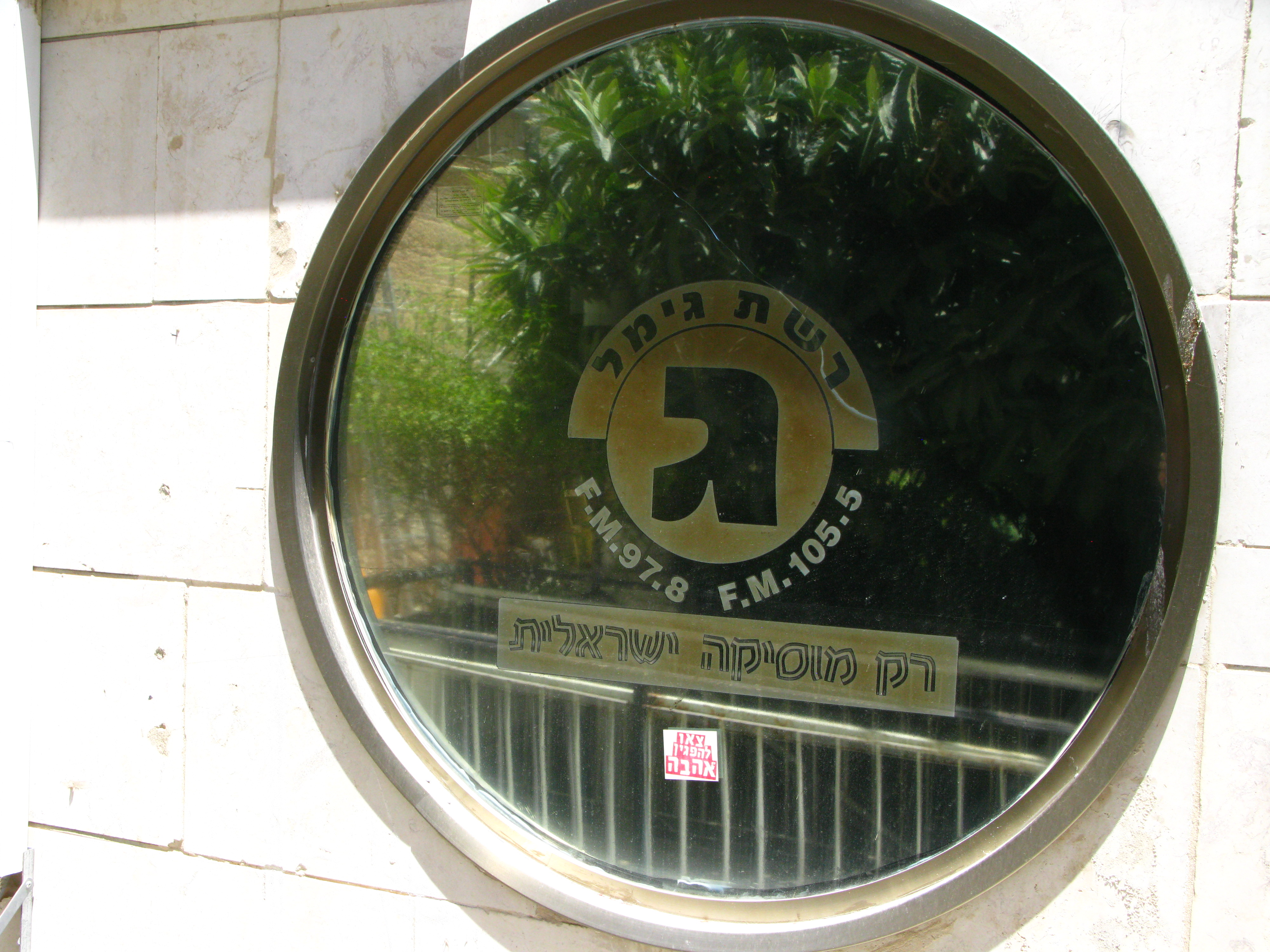 בניין קול ישראל ברחוב הלני המלכה בירושלים, משמש את תחנת הרדיו "קול ישראל" מאז ימי הרדיו המנדטורי ב-1939, ולסגירת רשות השידור.